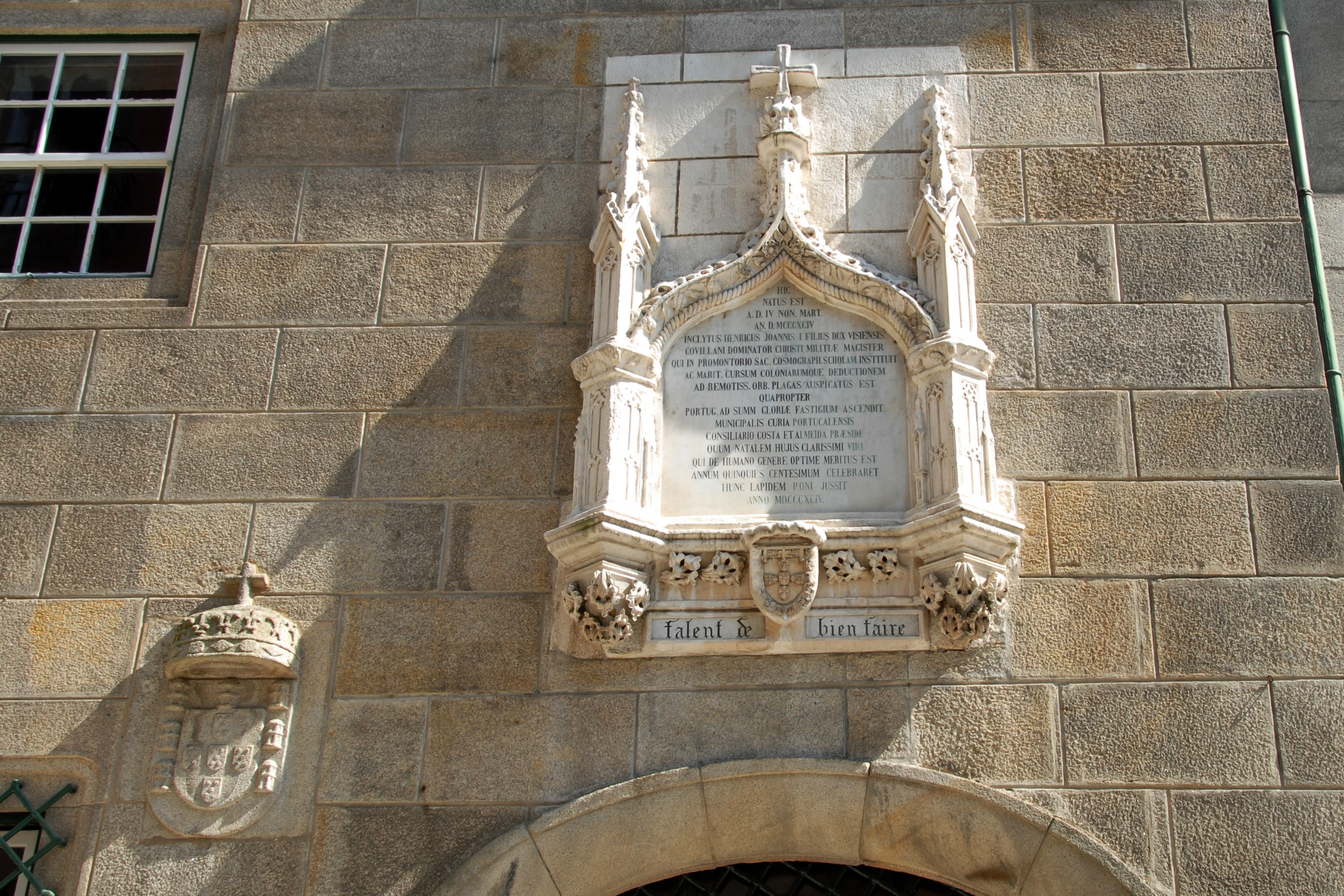 Casa da Rua da Alfândega Velha ou Casa do Infante This file was uploaded for Wiki Loves Monuments in Portugal with the unique identifier 70201.